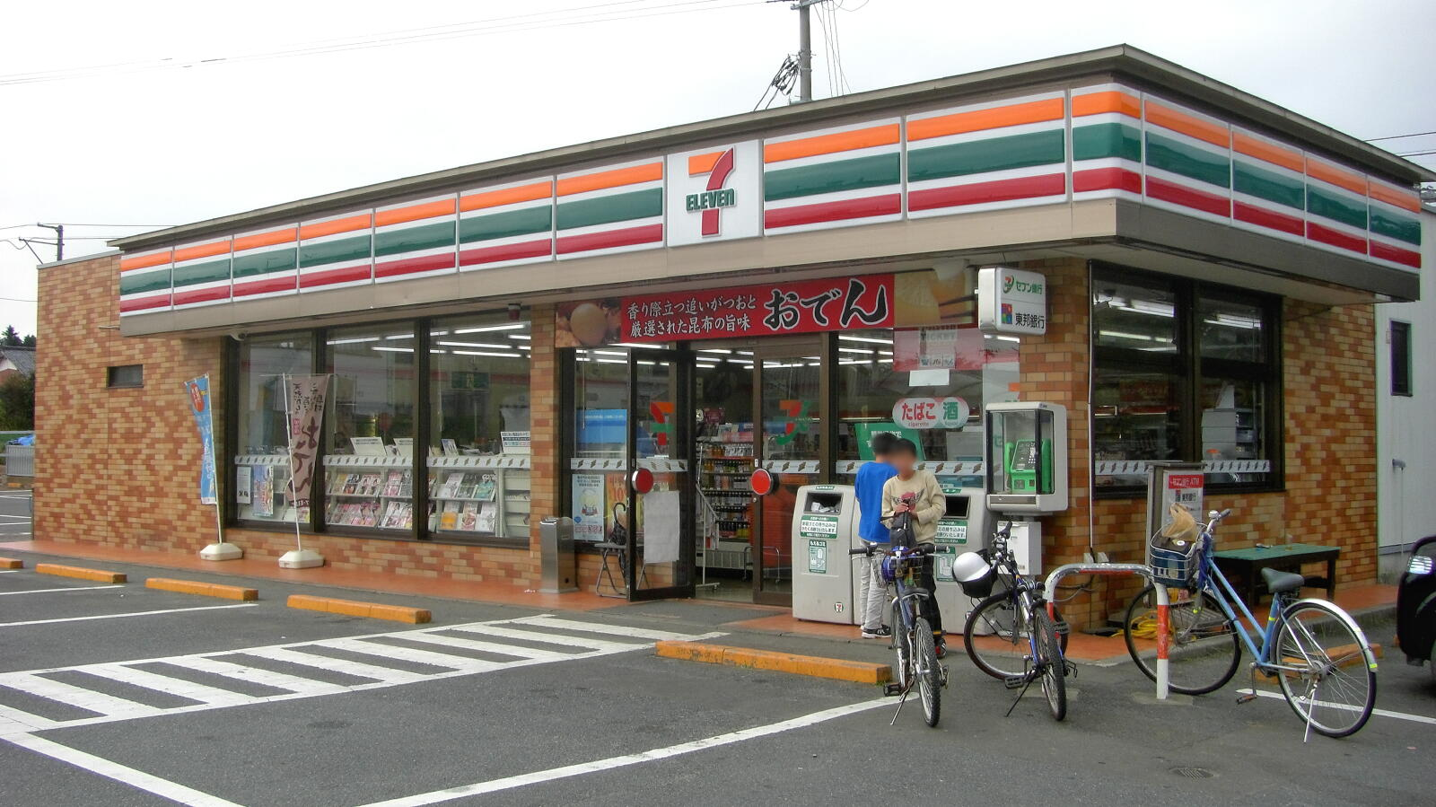 セブン-イレブン福島新地町店